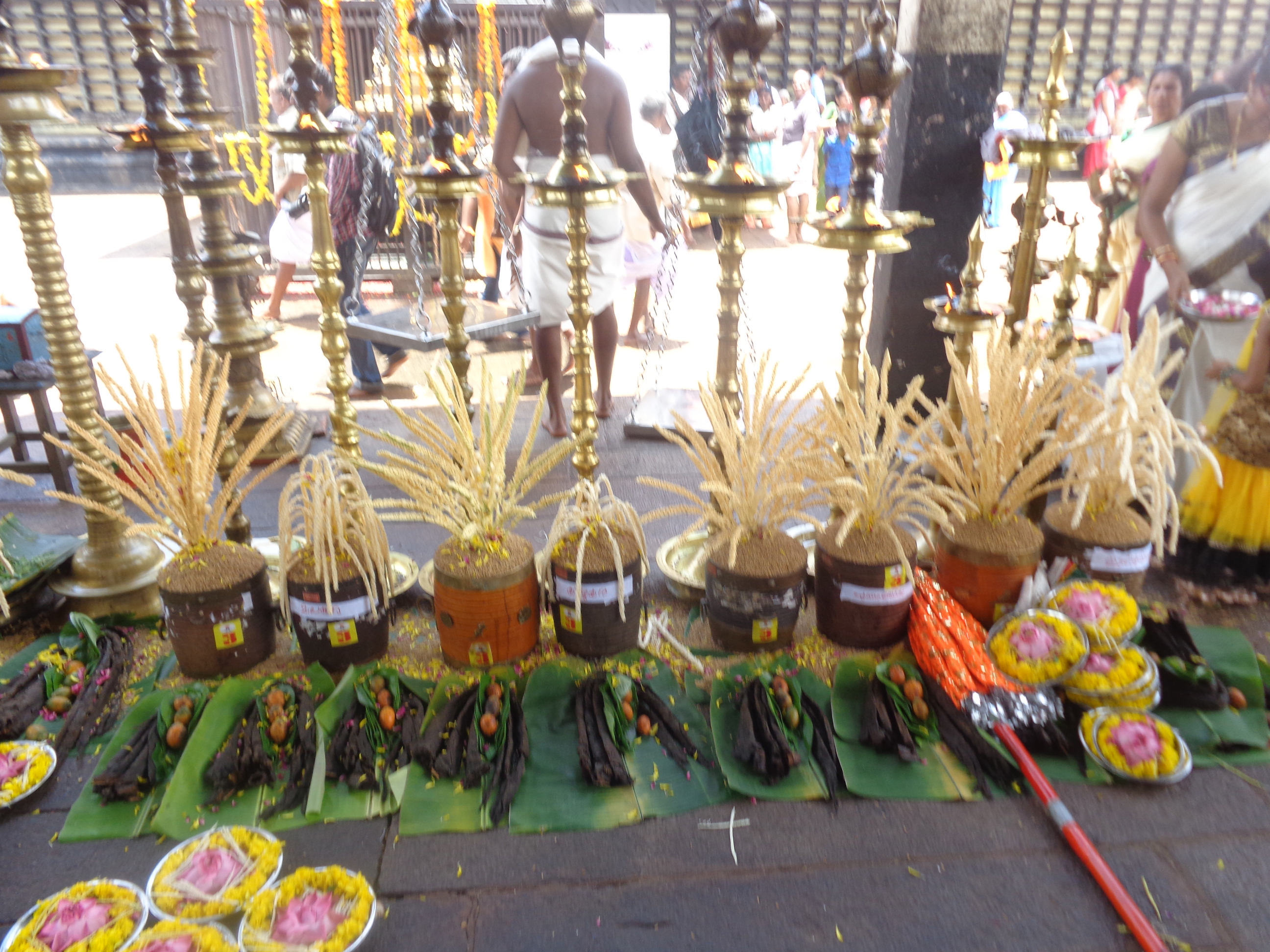 offering in front of putAranmula parthasarathi